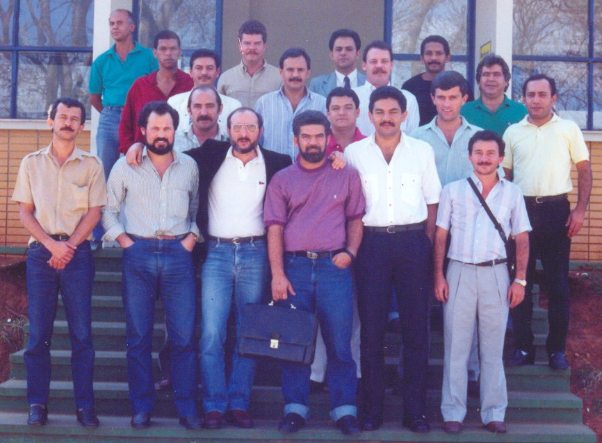 Foto dos Fundadores da Federação Nacional dos Policiais Federais - FENAPEF - Brasília - DF